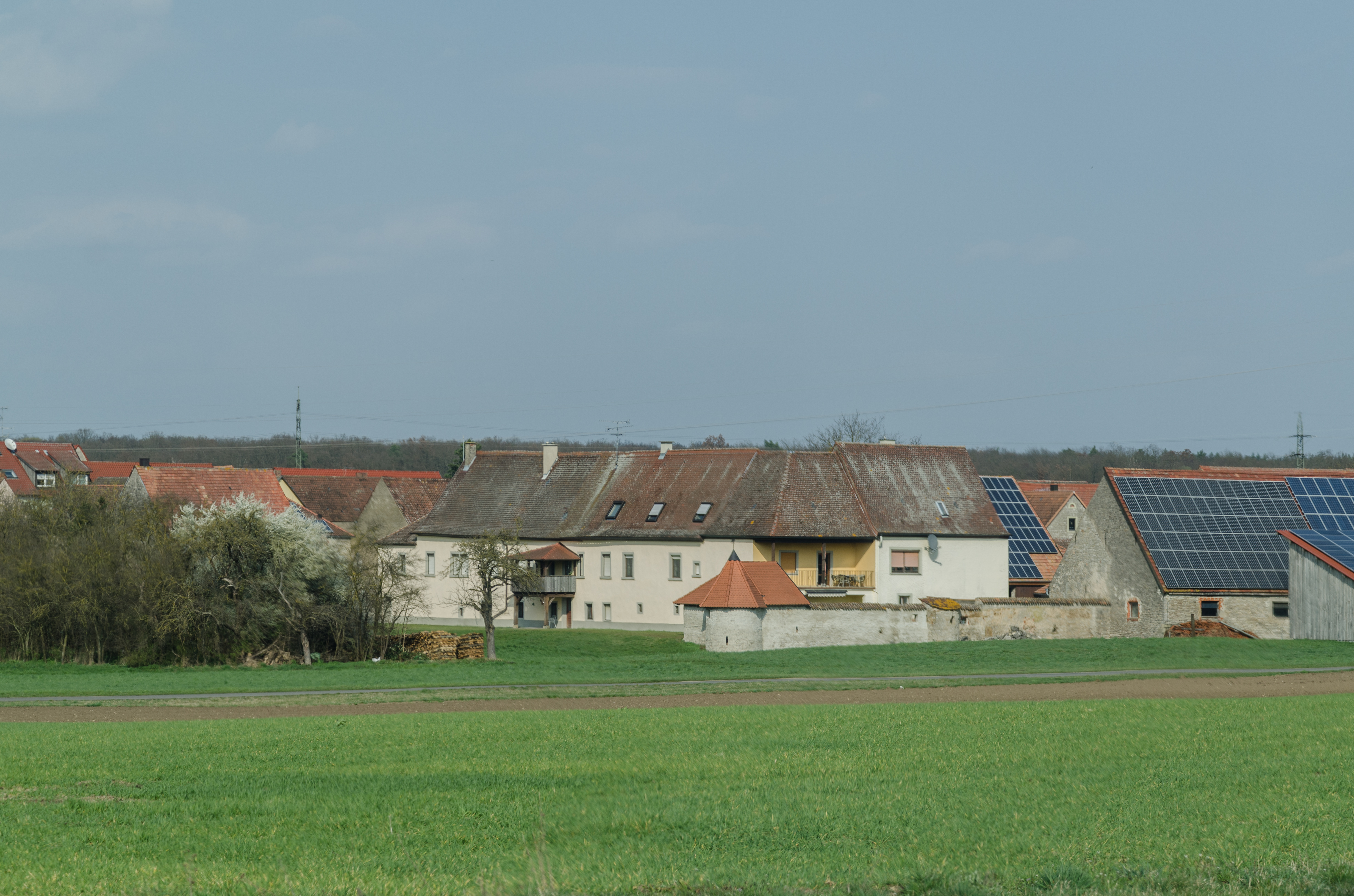 Marksteft, Michelfeld, Schloßstraße 1